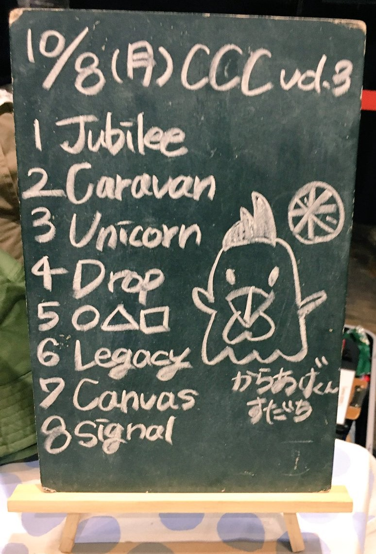 amiinAセトリボード(20181008(1))